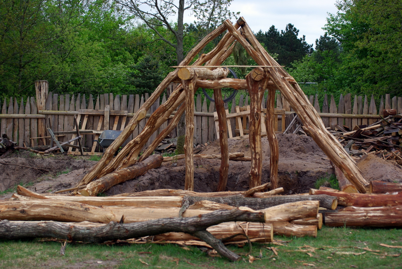 Valsgaard